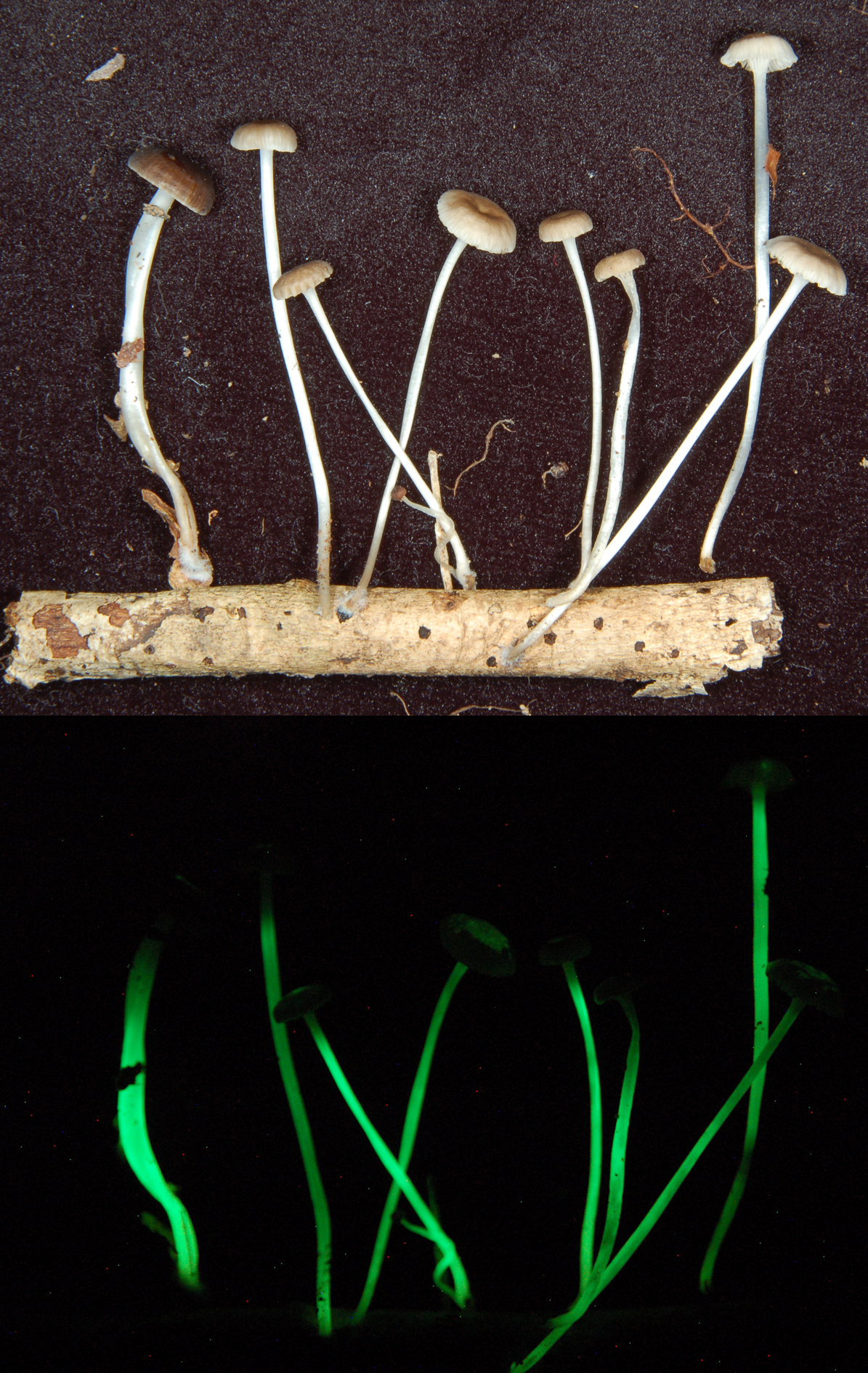 Fungo Mycena luxaeterna proveniente do Parque Estadual Turístico do Alto Ribeira (PETAR), município de Iporanga, SP, Brasil, fotografado sob iluminação e no escuro.